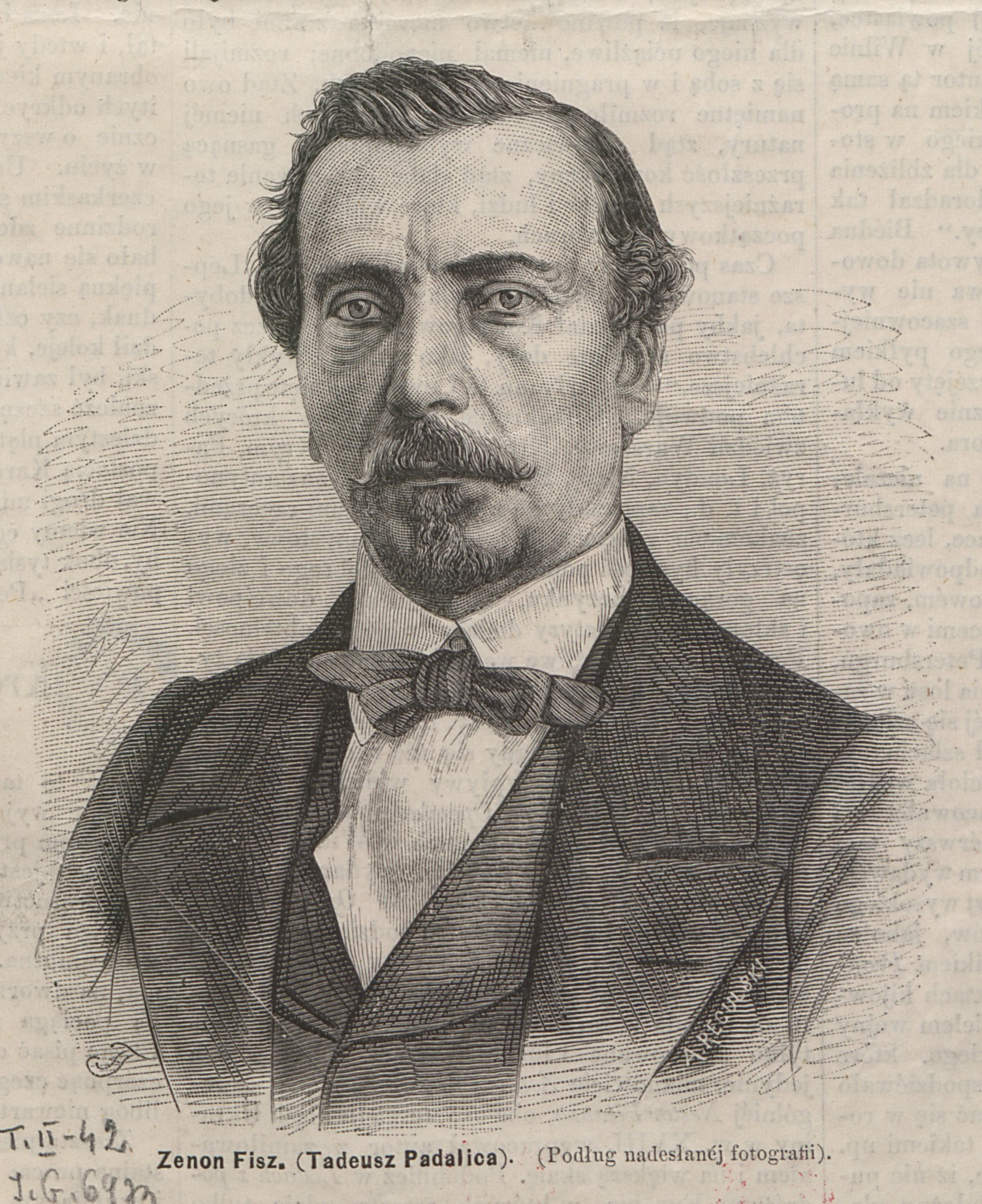 Zenon Fisz